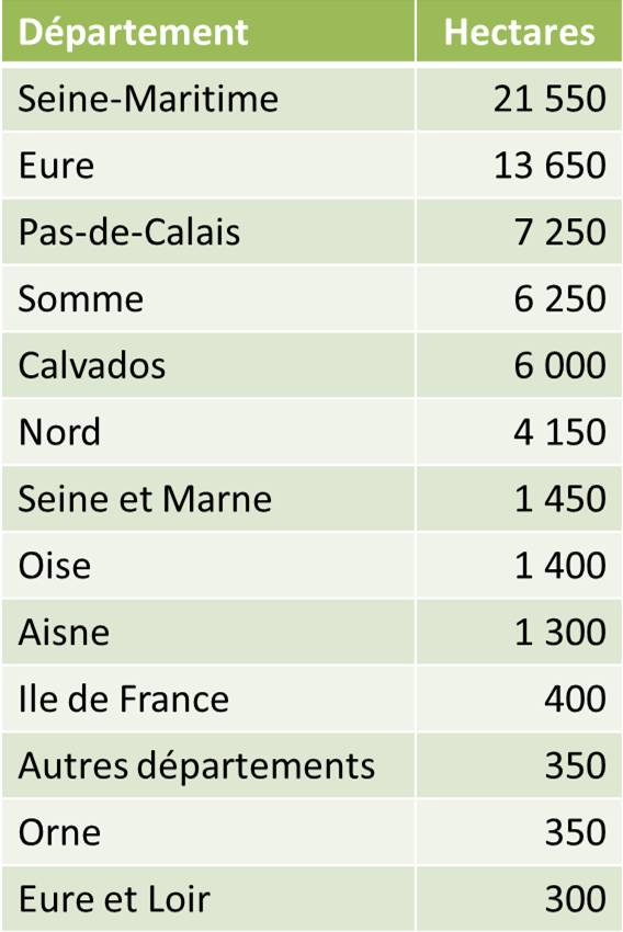 Détail de la production française, en 2012.